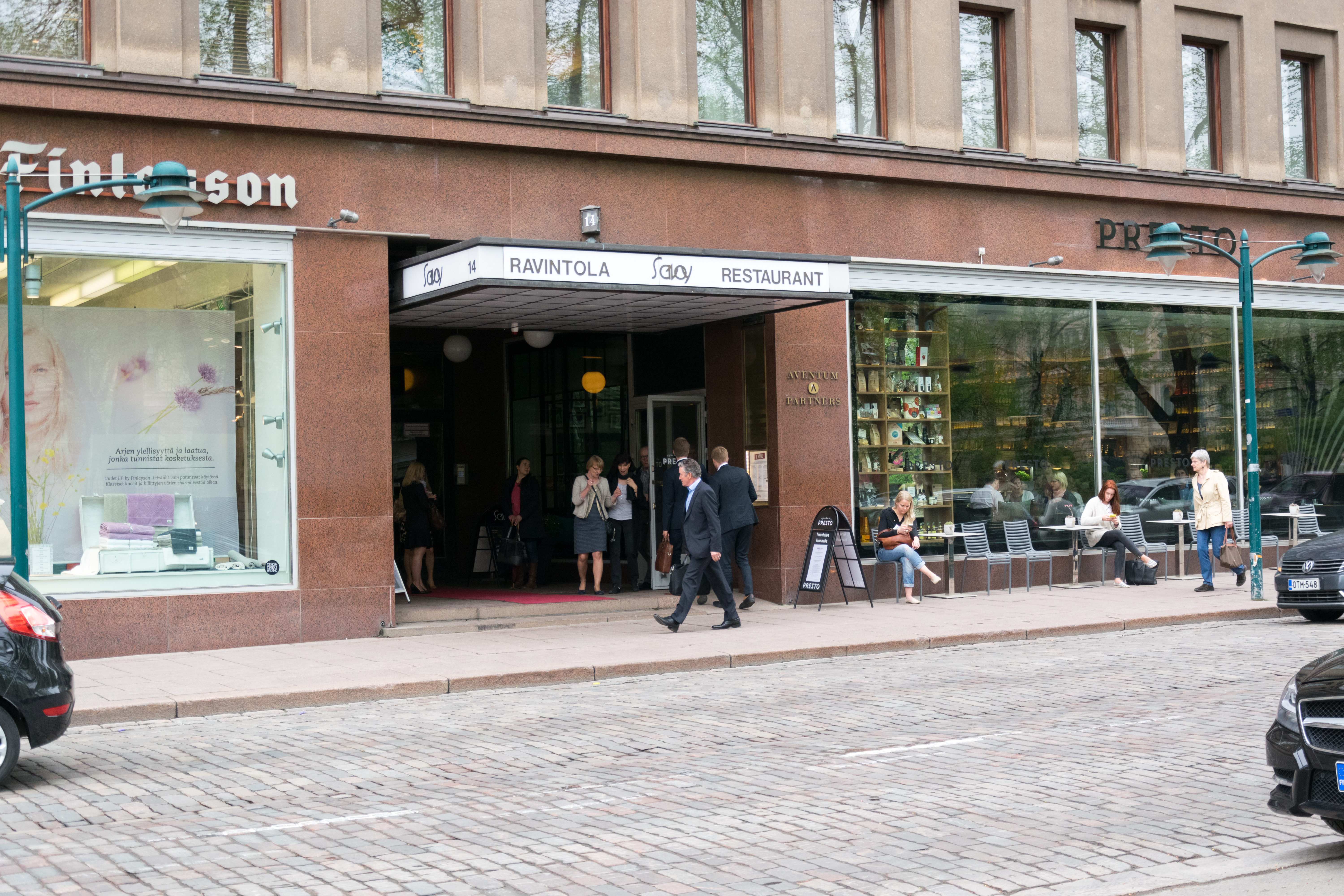 Ravintola savoy helsingissä